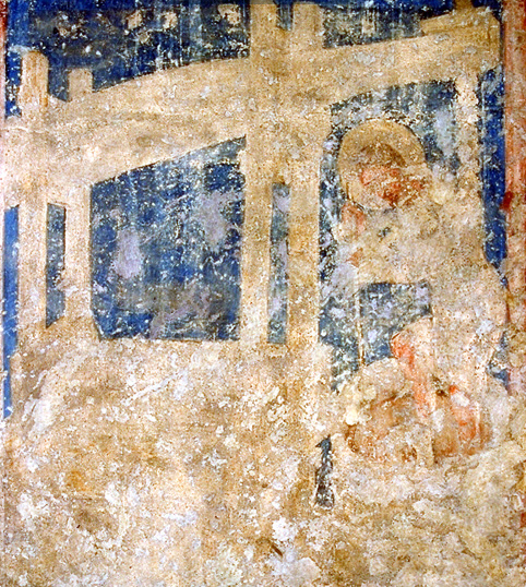 Christus in der Kelter; Fresko im Nordflügel des Kreuzganges des Emamusklosters in Prag.